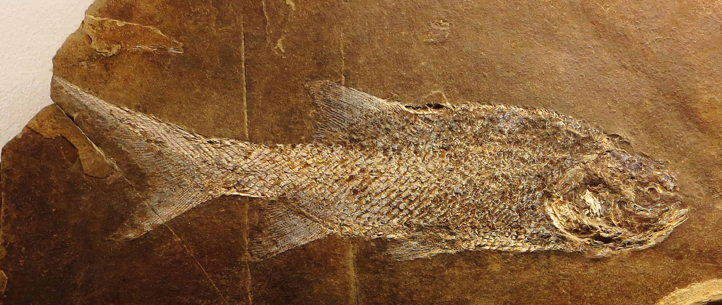 Fossil of Aeduella, an extinct fish- Took the picture at Museum of Paleontology, Tuebingen